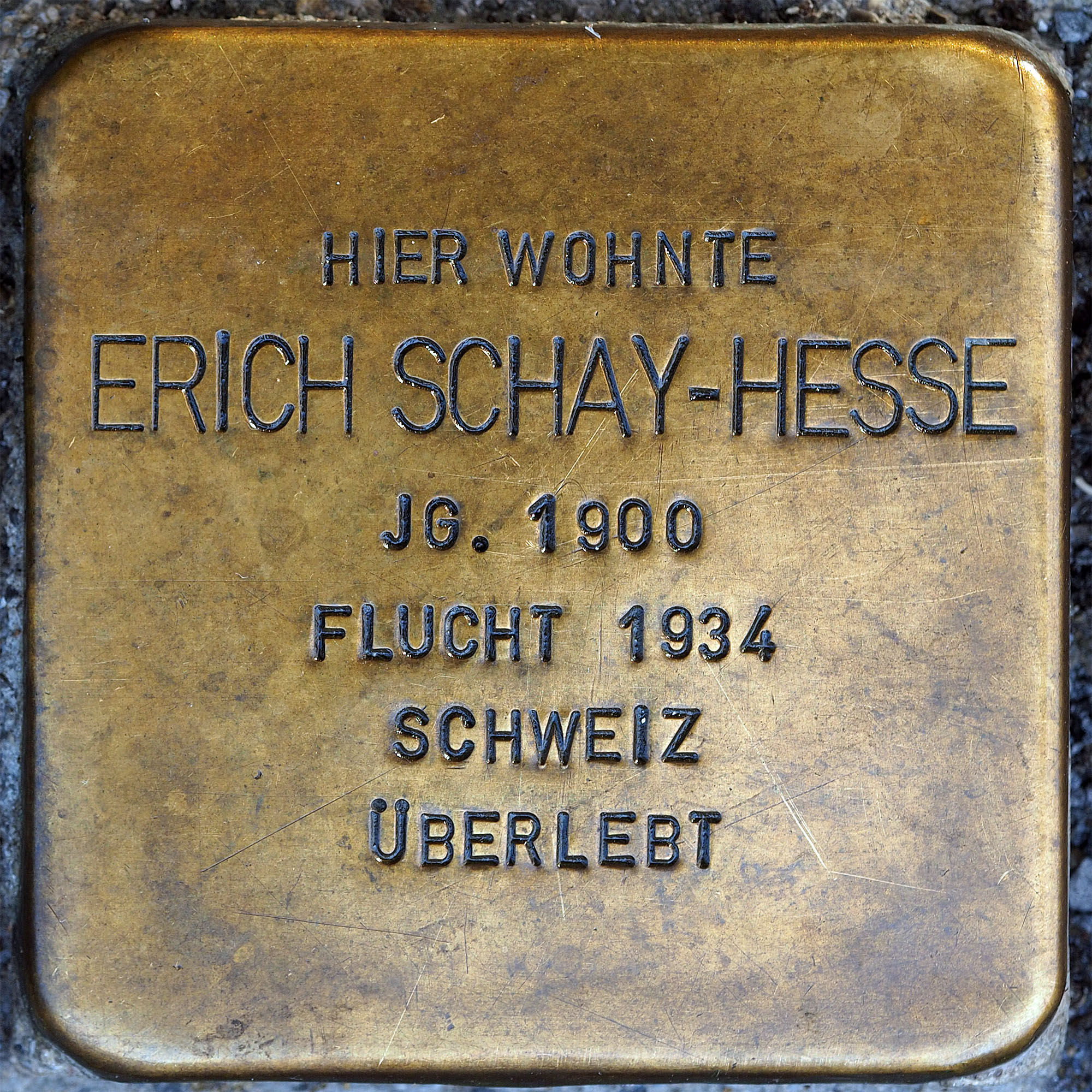 Stolpersteine Wesel: Schay-Hesse, Erich